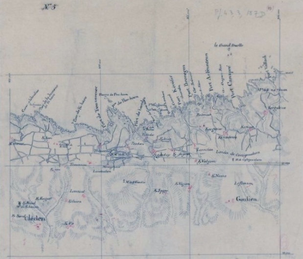 Carte du littoral de Goulien et Cléden-Cap-Sizun datant de la période 1778-1785.